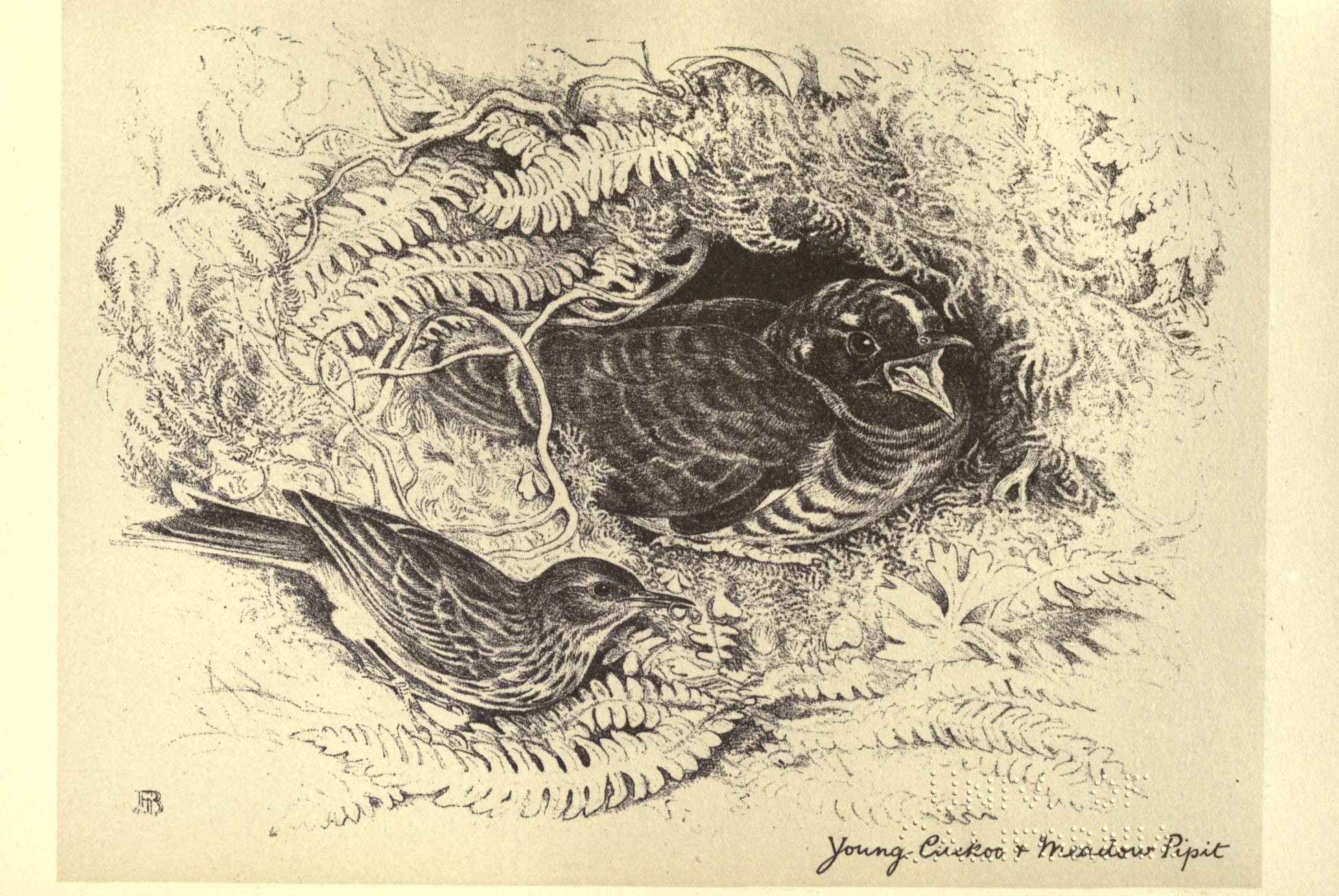 / **;;-,'I' -' -y . ;Tk'^J ^ -.-c:'^ -e. ." ~-^._